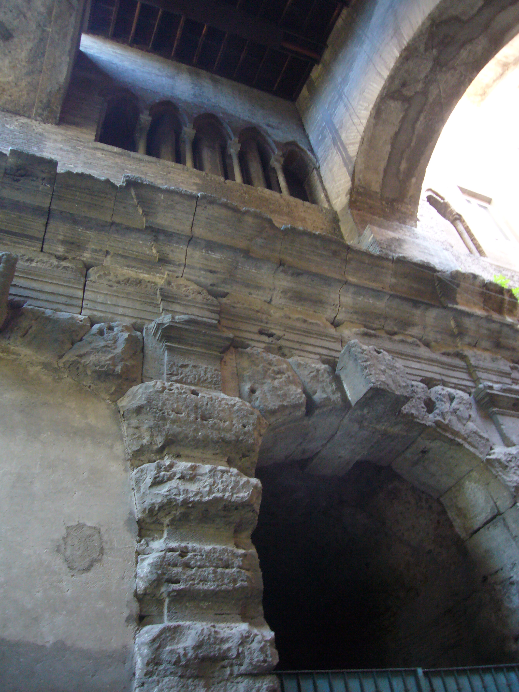 Roma, tempio del Divo Claudio, polifora